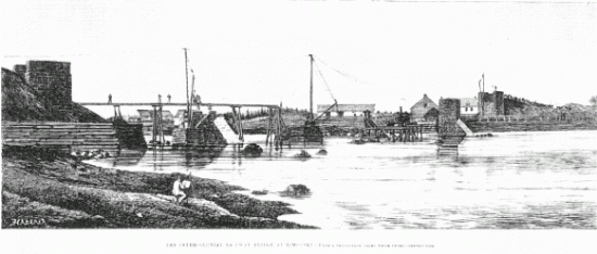 Construction du pont de l'Intercolonial Railway en 1872 à l'embouchure de la rivière Rimouski.